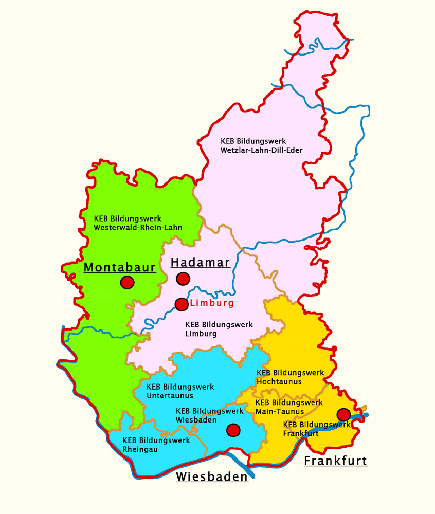 Karte der 9 KEB-Bildungswerke im Bistum Limburg mit Sitz in Hadamar, Montabaur, Frankfurt und Wiesbaden.